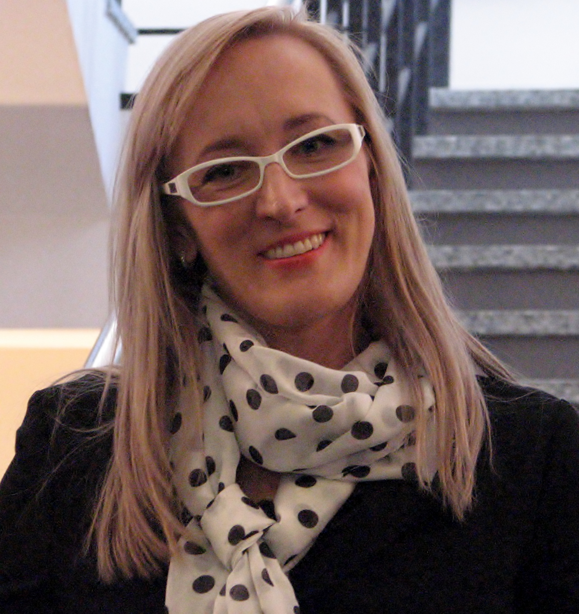 Birk Rohelend esinemas rahvusvahelise luulepäeva luulemaratonil Tallinna Keskraamatukogus 21. märtsil 2014